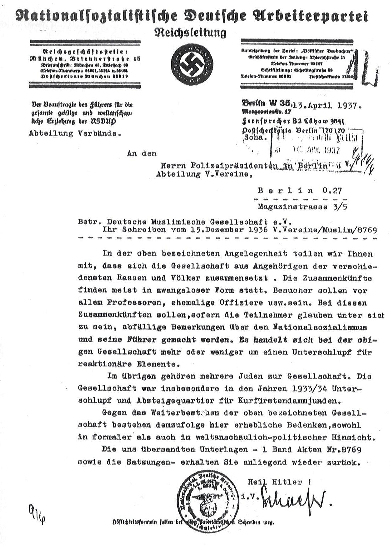 Die Nationalsozialisten sahen in der „Deutschen Muslimischen Gesellschaft e. V.“ einen Zufluchtsort für Kurfürstendammjuden und sollte demnach nicht weiter bestehen bleiben.